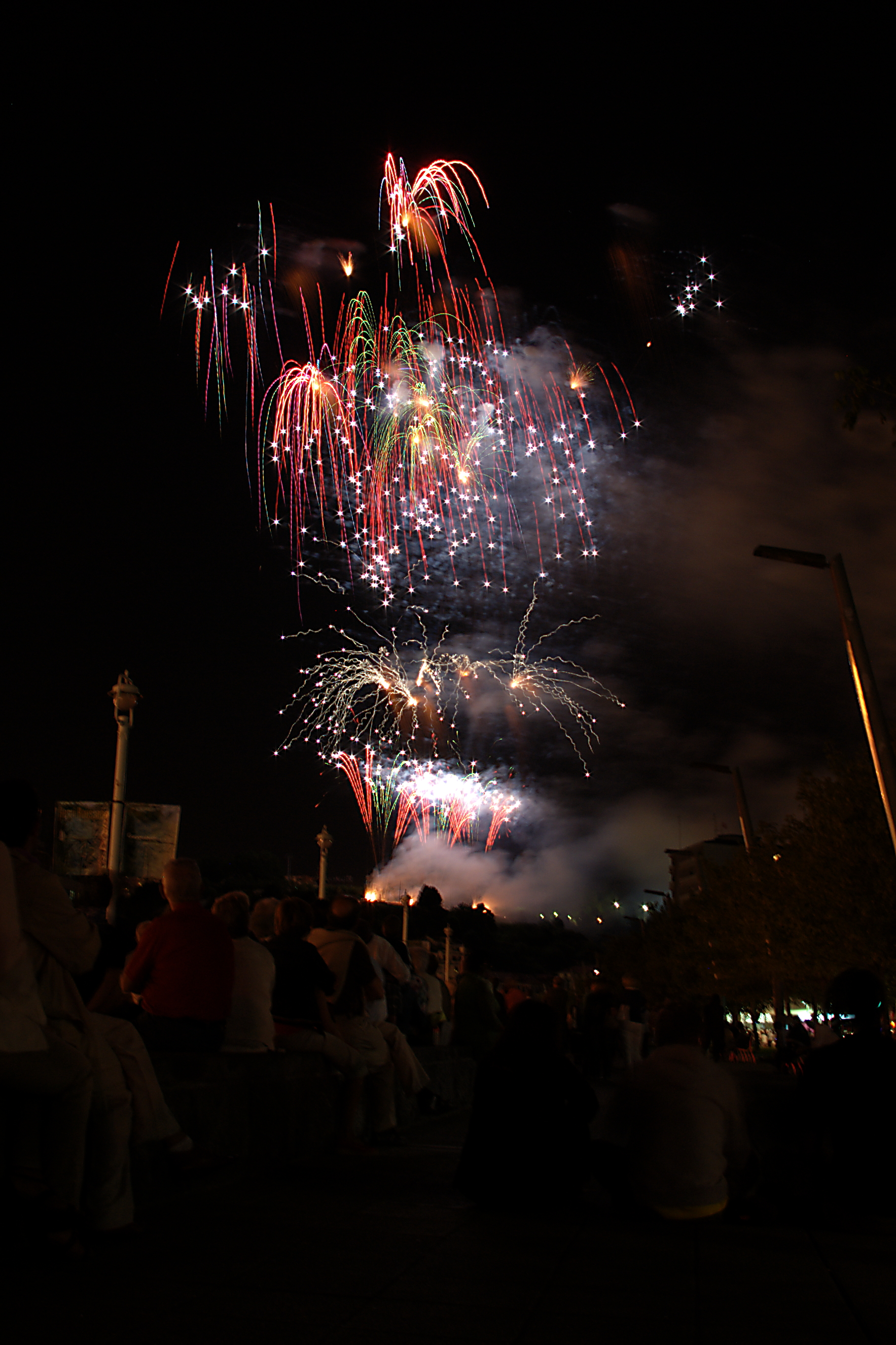 Fuegos lanzados el segundo domingo para el concurso de la Aste Nagusia de Bilbao 2010 por la pirotécnica 'Pirofantasía Carlos Caballer' de Valencia